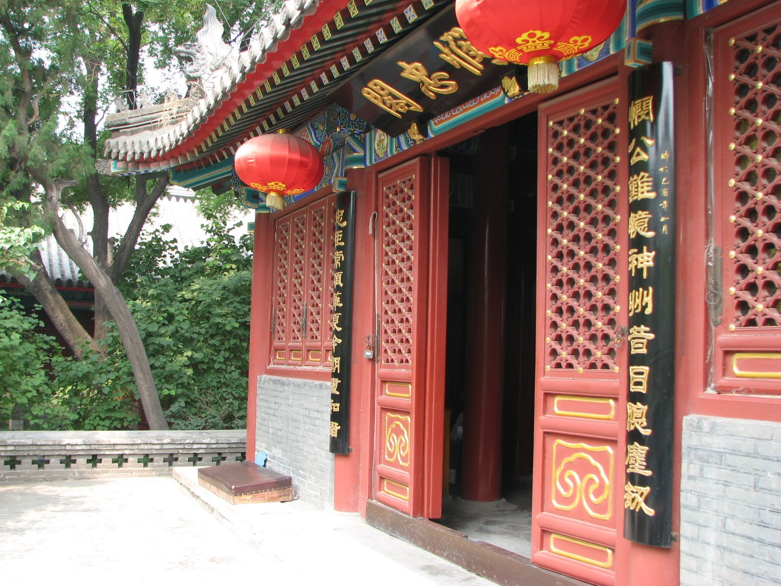 北京法源寺之悯忠台